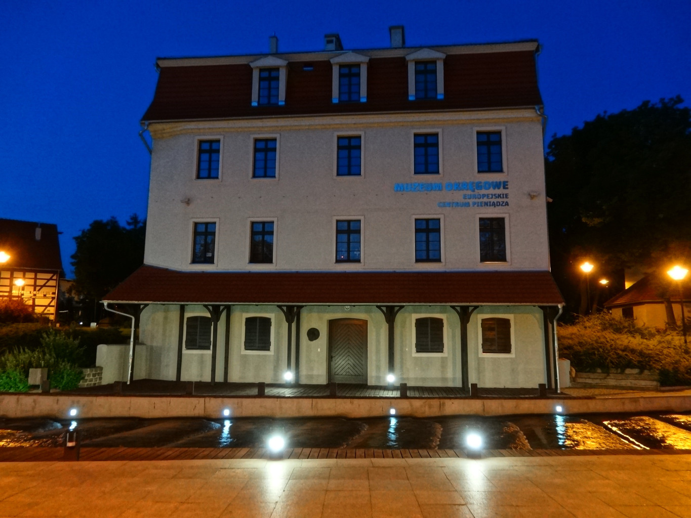 Kaskada Międzywodzie na Wyspie Młyńskiej w Bydgoszczy, odtworzona w 2007 roku